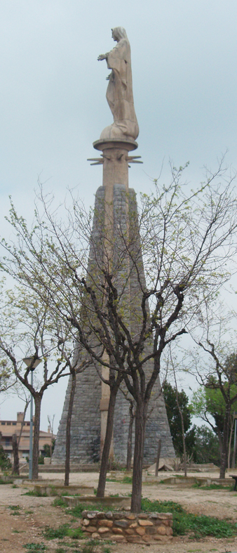 Monumento al Corazón de María (Tudela), en 2007